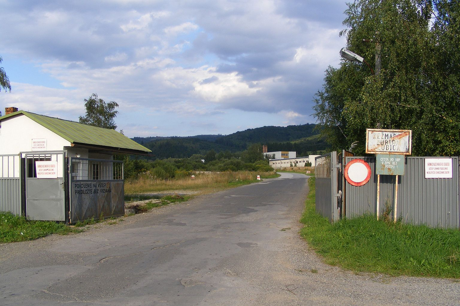 Vstup do byvaleho vojenskeho vycvikoveho priestoru Javorina, okres Kezmarok